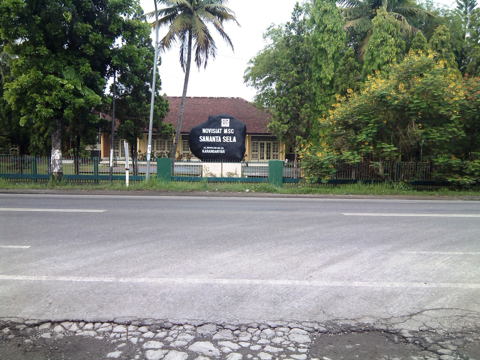 Novisiat MSC Sananta Sela, Jl. Revolusi No. 33 Karanganyar, Kebumen, Jawa Tengah, Indonesia